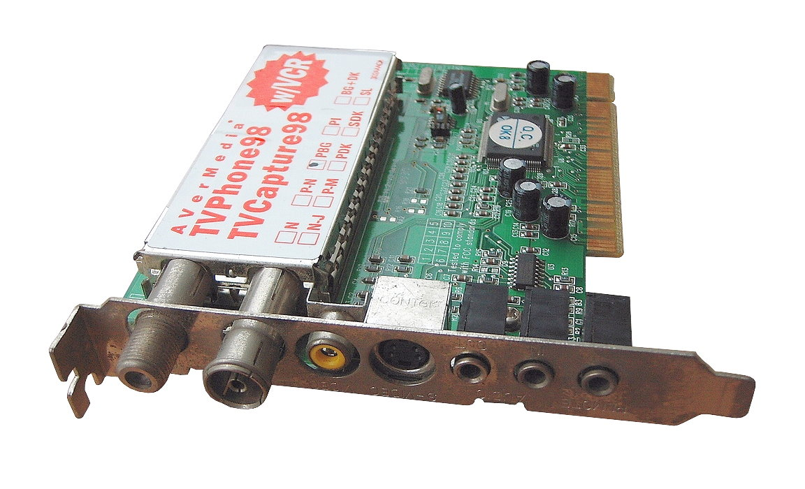 Capturadora AVerMedia TVPhone98 This is a TV tuner card, model TVPhone98, from AVerMedia (chip bt878). I took the photo. Connectors, left to right: FM and TV antennae, video (RCA) and S-Video input, audio out, audio in, remote control.